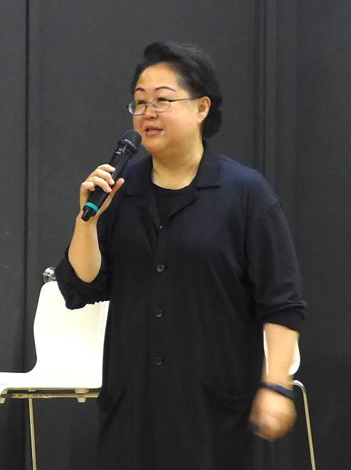 Ada Ying-Kay WONG